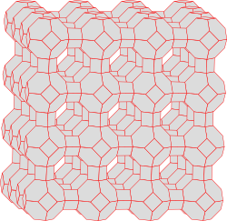 Zeolith-A-Bildung eines makroskopischen Anions